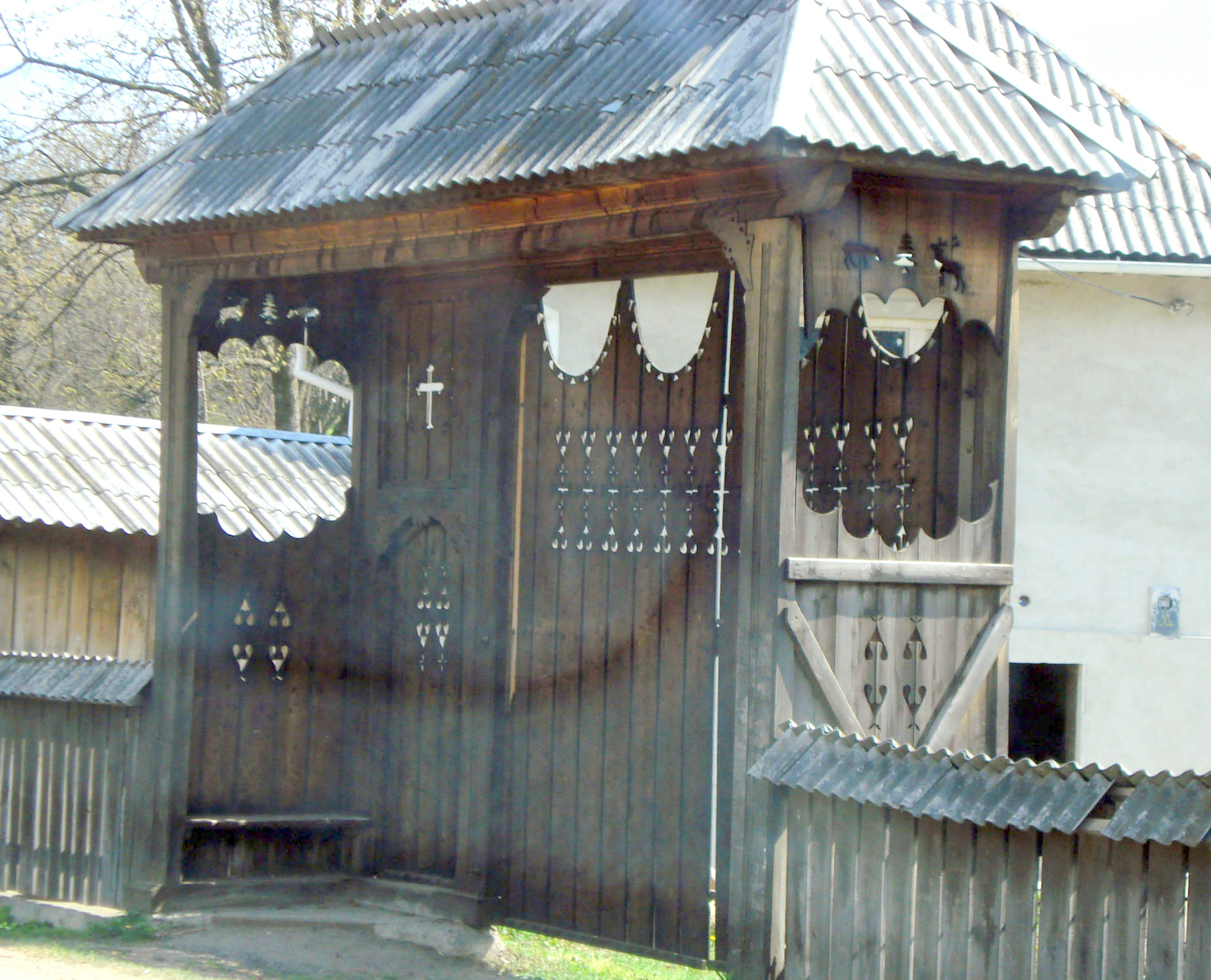 wooden gate in Mara (formerly Crăcești) village, Maramureș, Romania